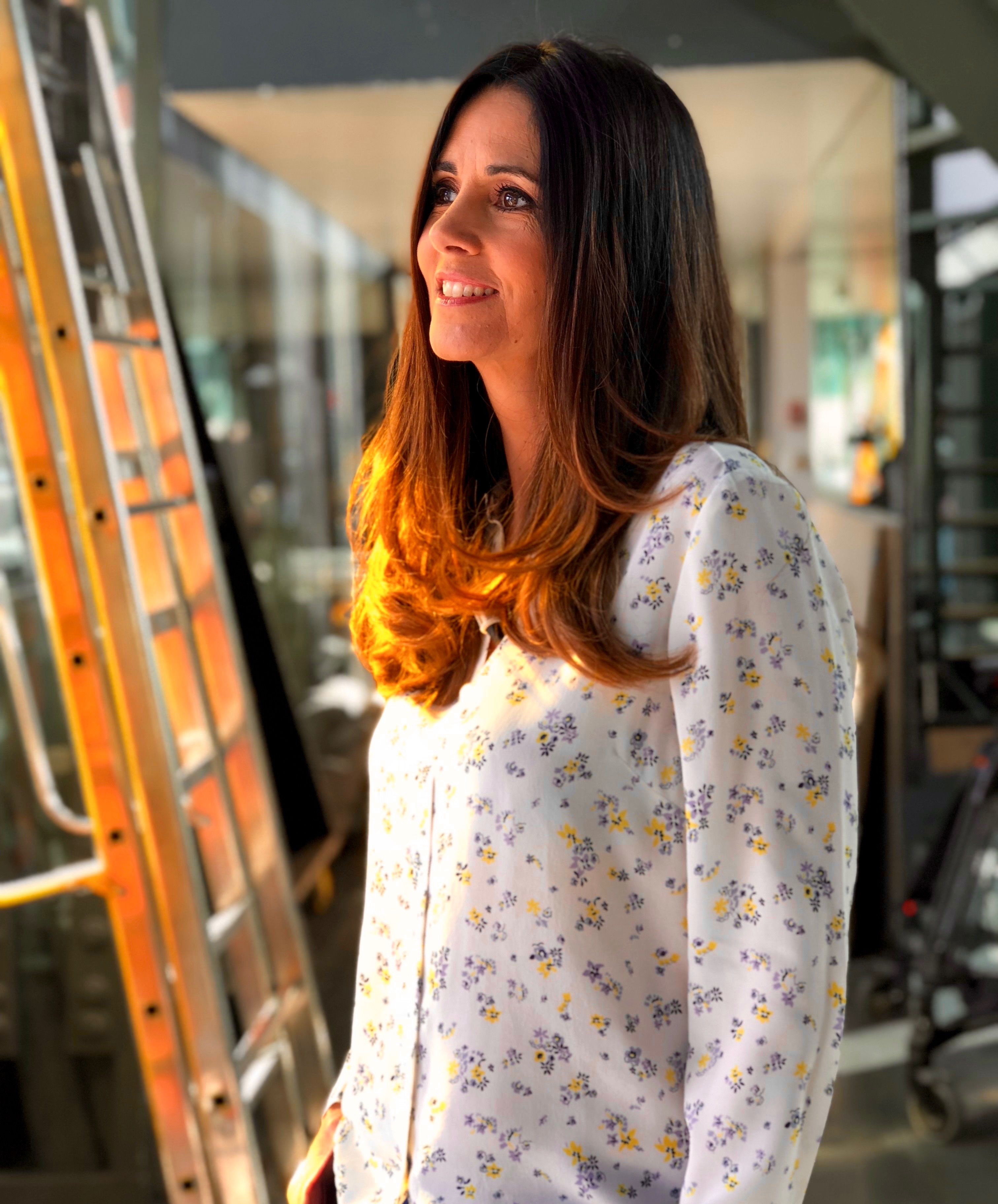 Plateau TV